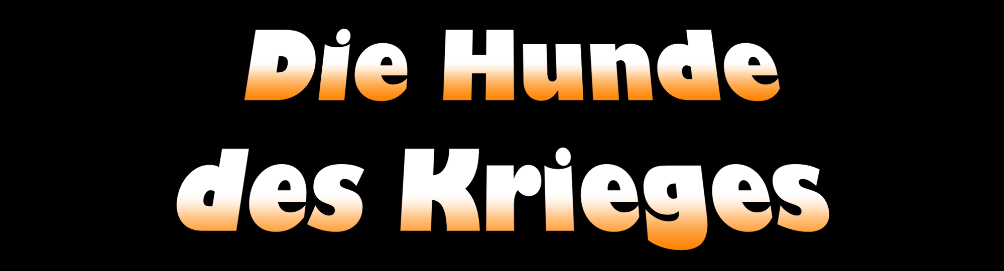 The Dogs of War German Logo